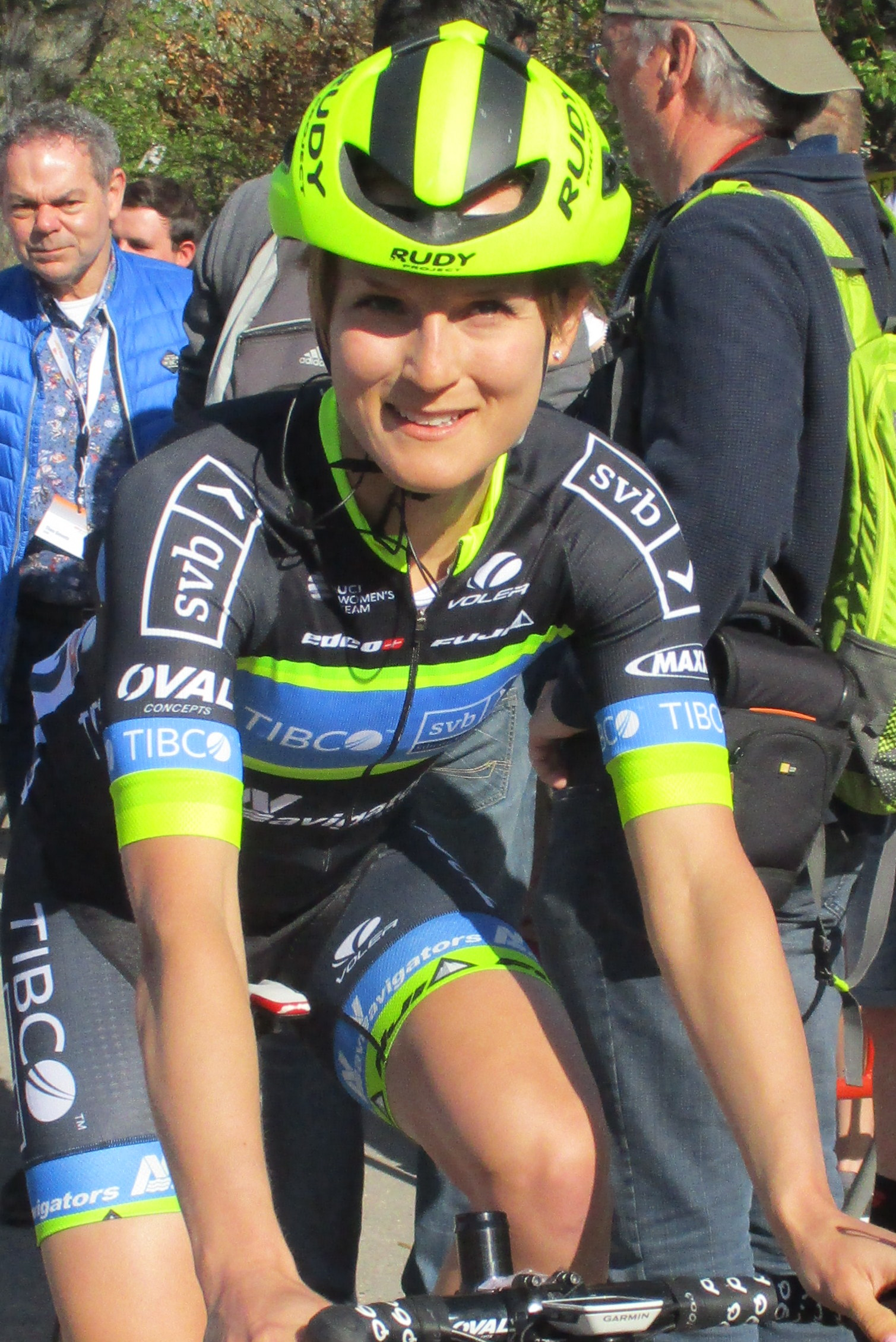 1e passage van de Waalse Pijl 2018 op de Mur van Huy.